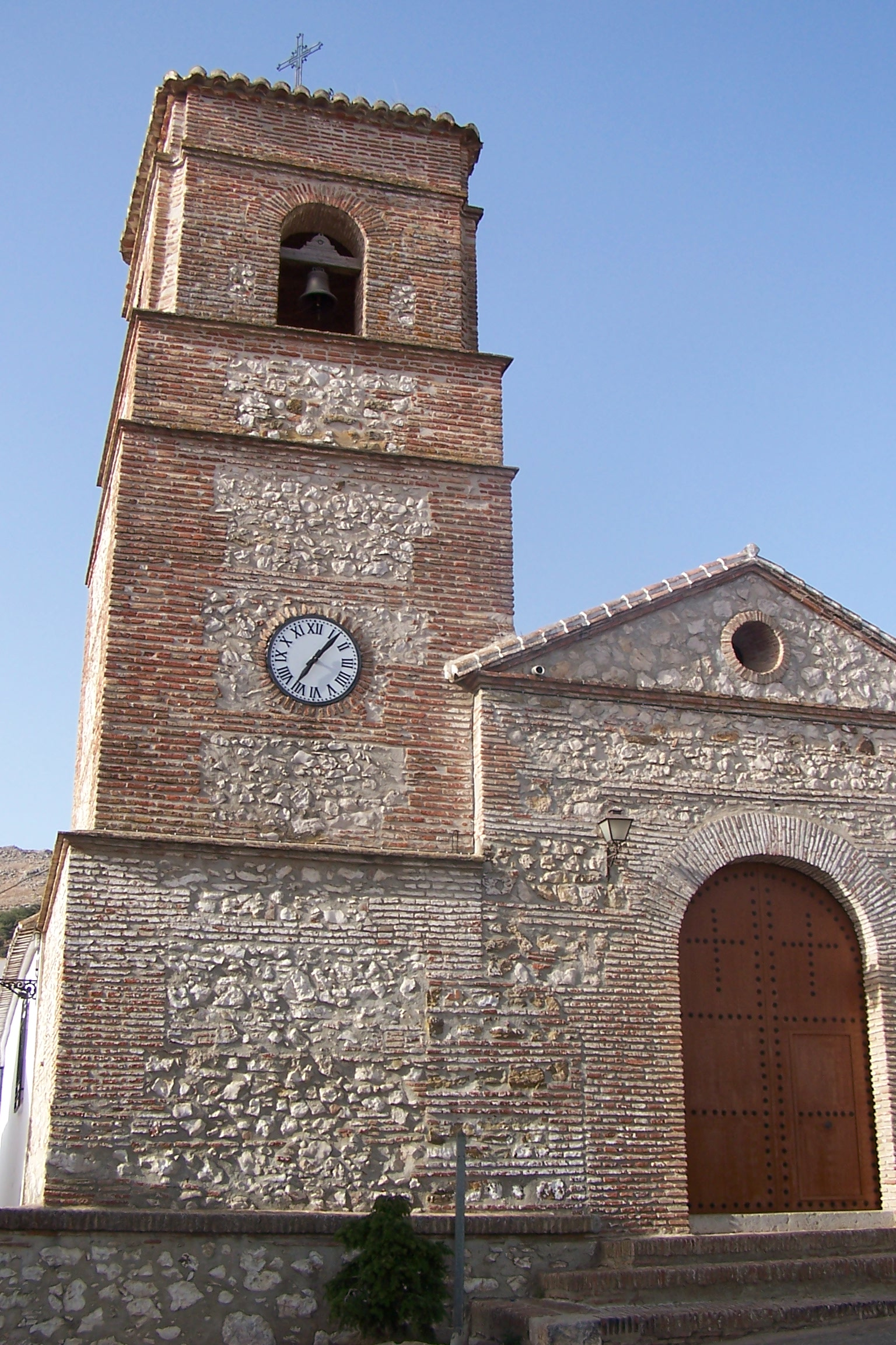 Henry Kelder